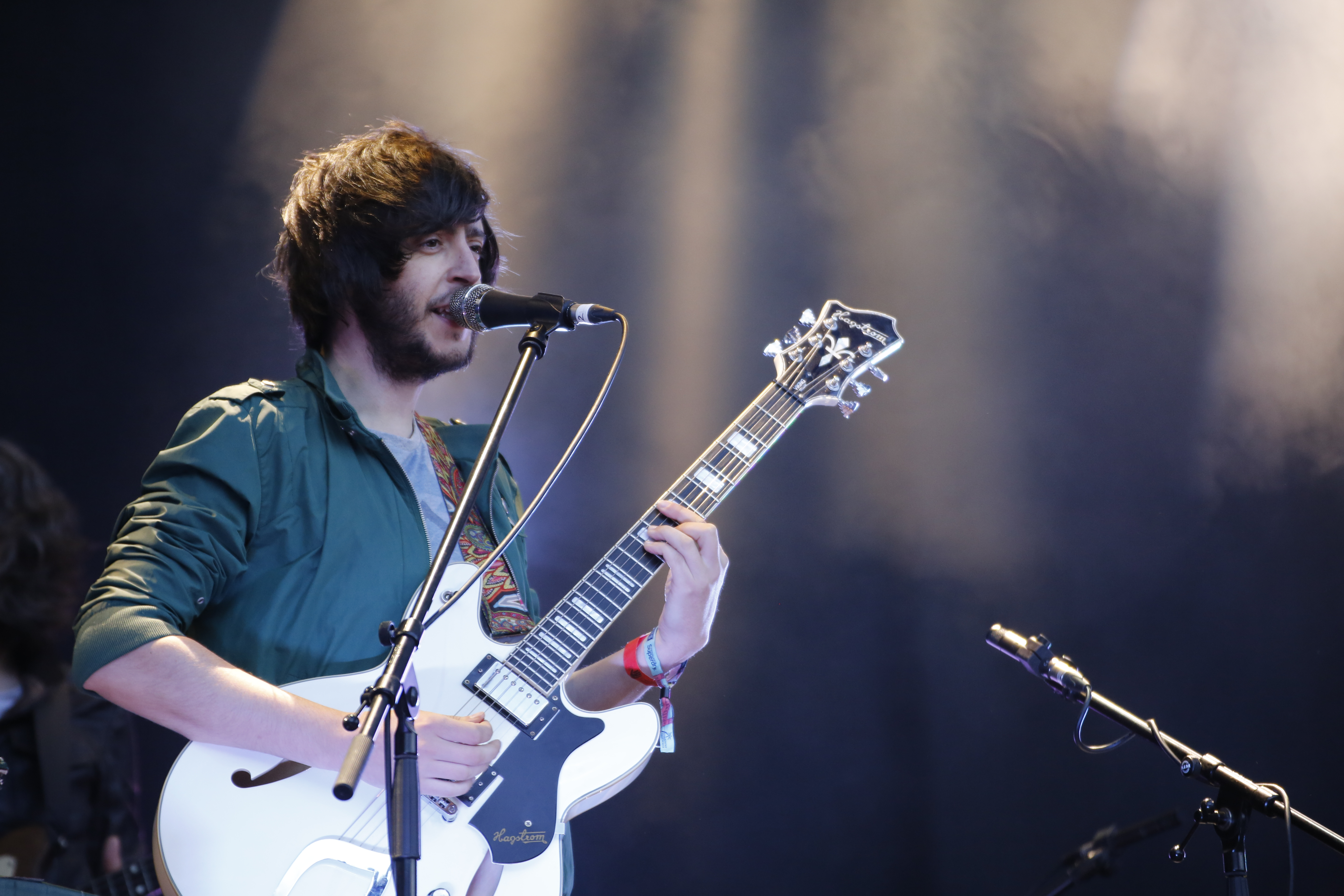 El grupo Rufus T. Firefly en el festival Palencia Sonora 2018. Víctor Cabezuelo, voz y guitarra.